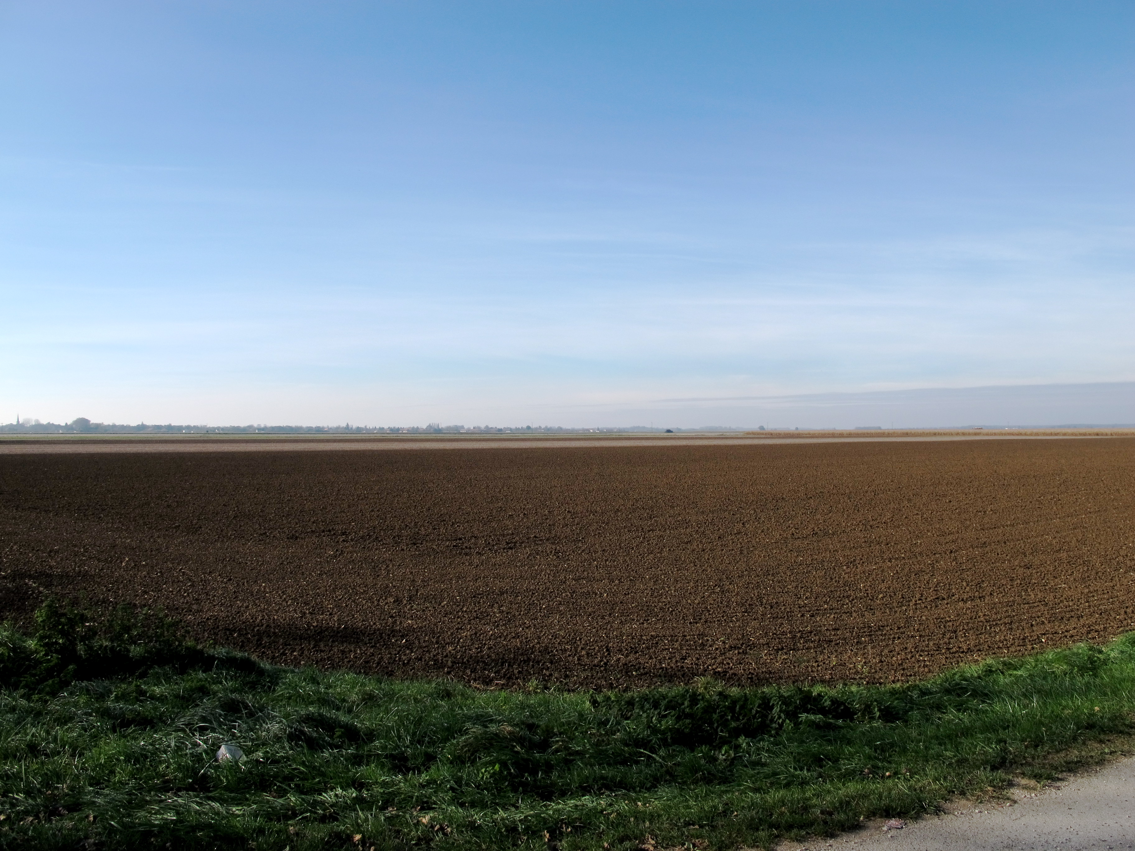 La plaine du Finage (Jura) est immense. Elle renferme de nombreux sites archéologiques très anciens.